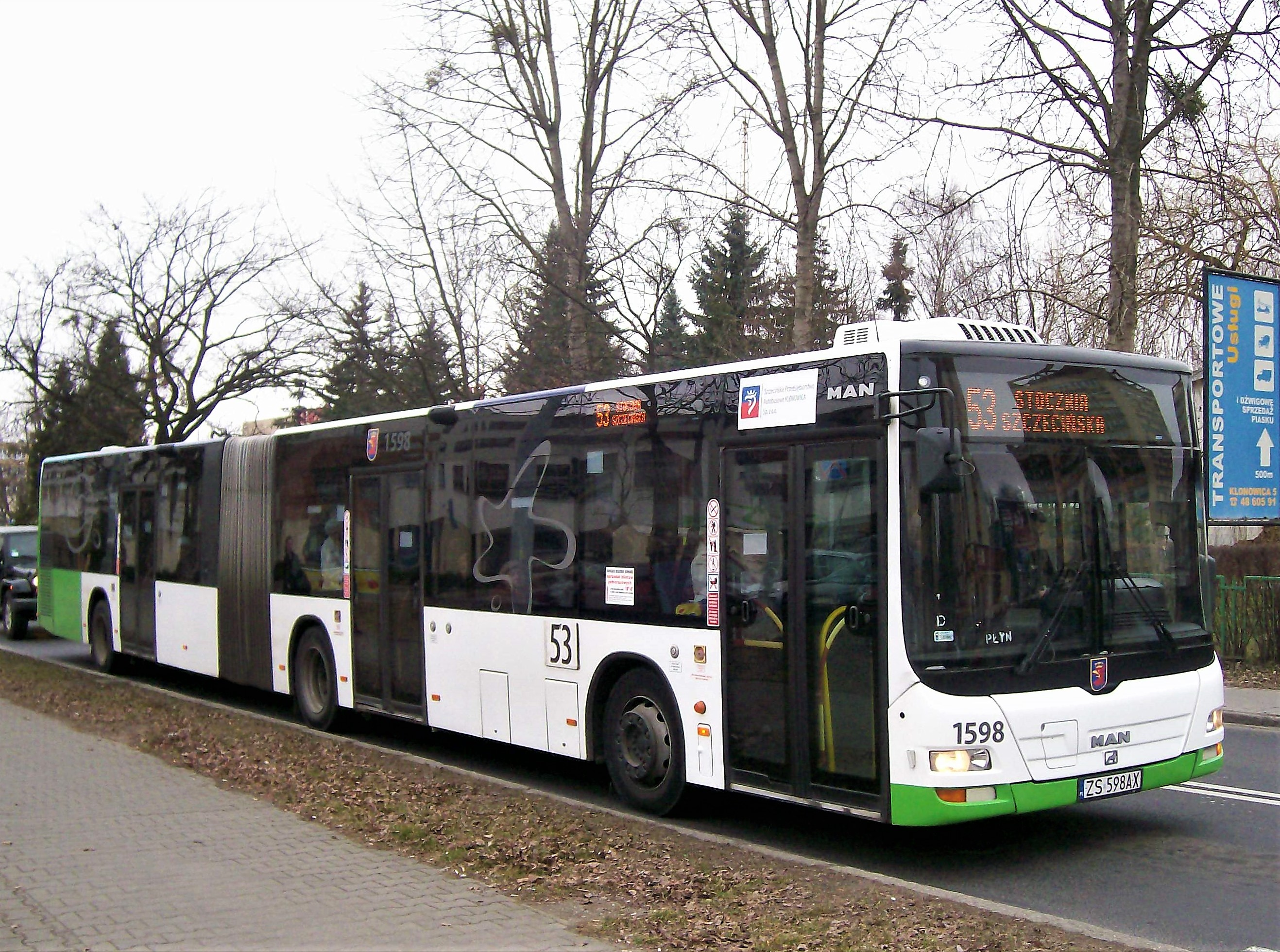 MAN NG 313 w Szczecinie